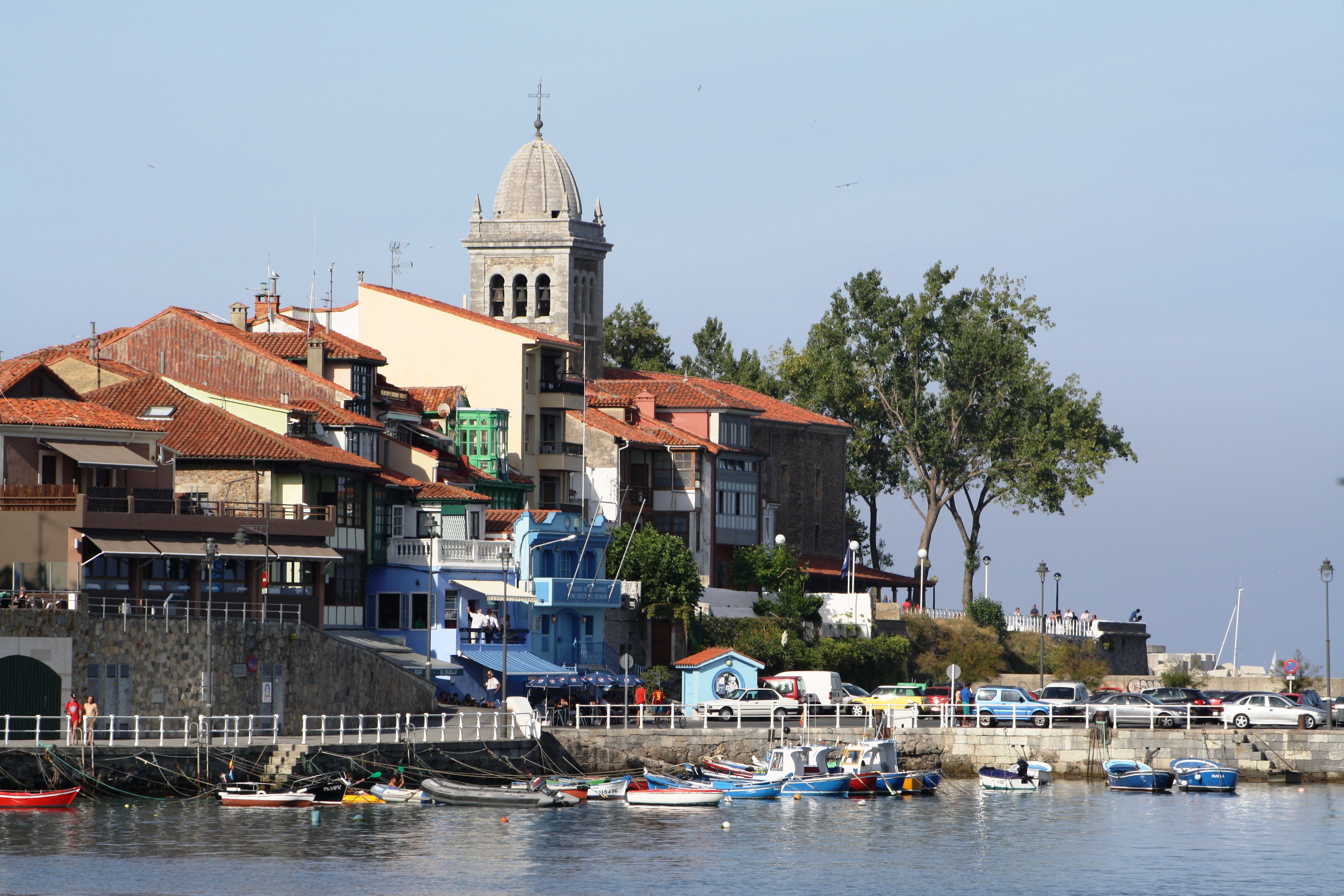 añoranza